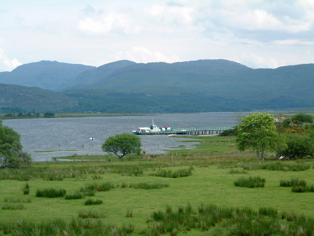 Acharacle Pier, Loch Shiel